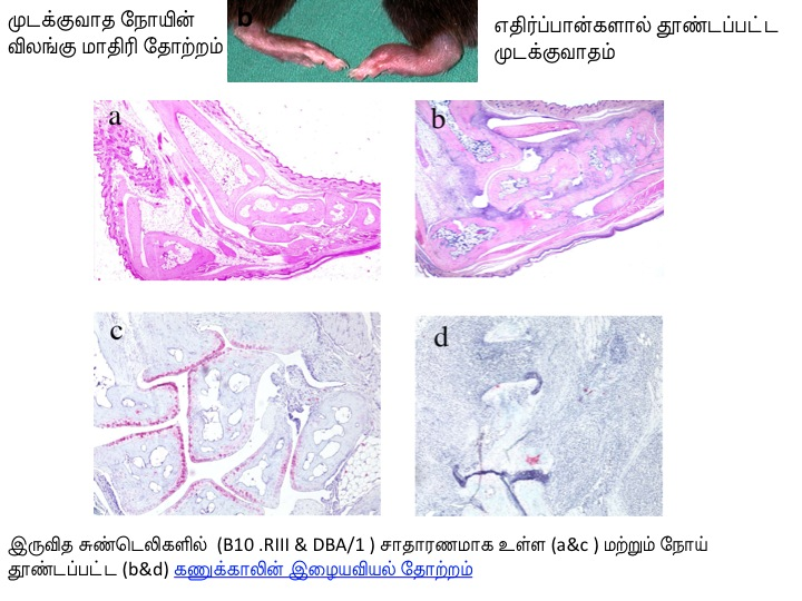 எதிர்ப்பான்களால் தூண்டப்பட்ட முடக்குவாதம் - 1